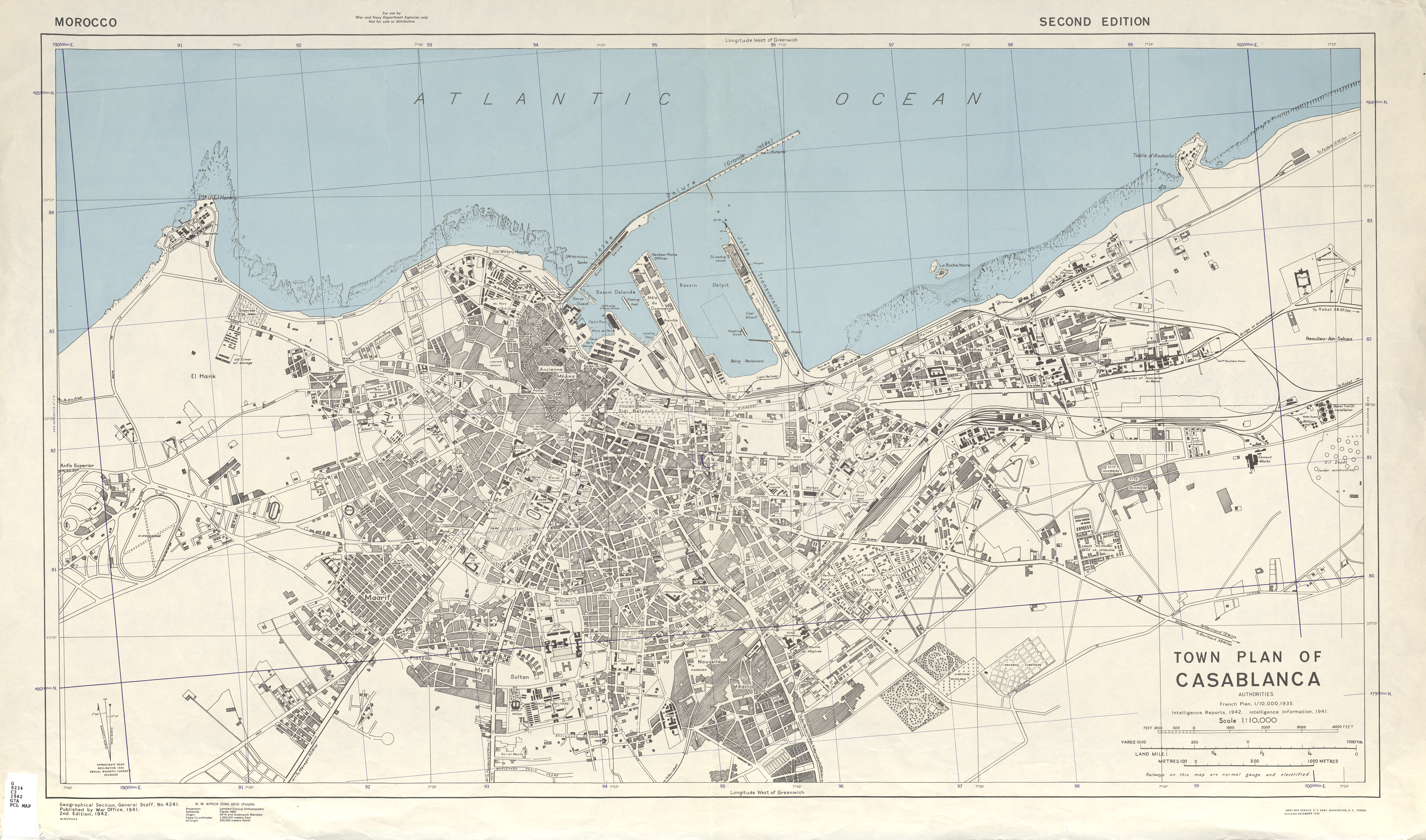 خريطة لمدينة الدار البيضاء المغربية من إعداد الحكومة الأميركية عام 1942 في الاستعداد للتنشط في المغرب خلال الحرب العالمية الثانية